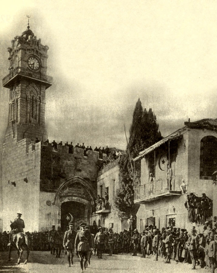 Jerusalem